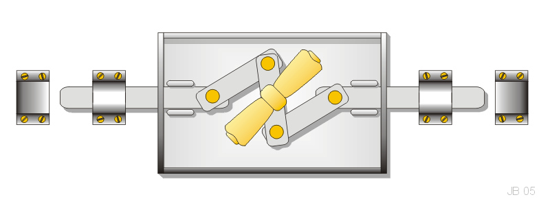 Schubstangenverriegelung (Basküle)